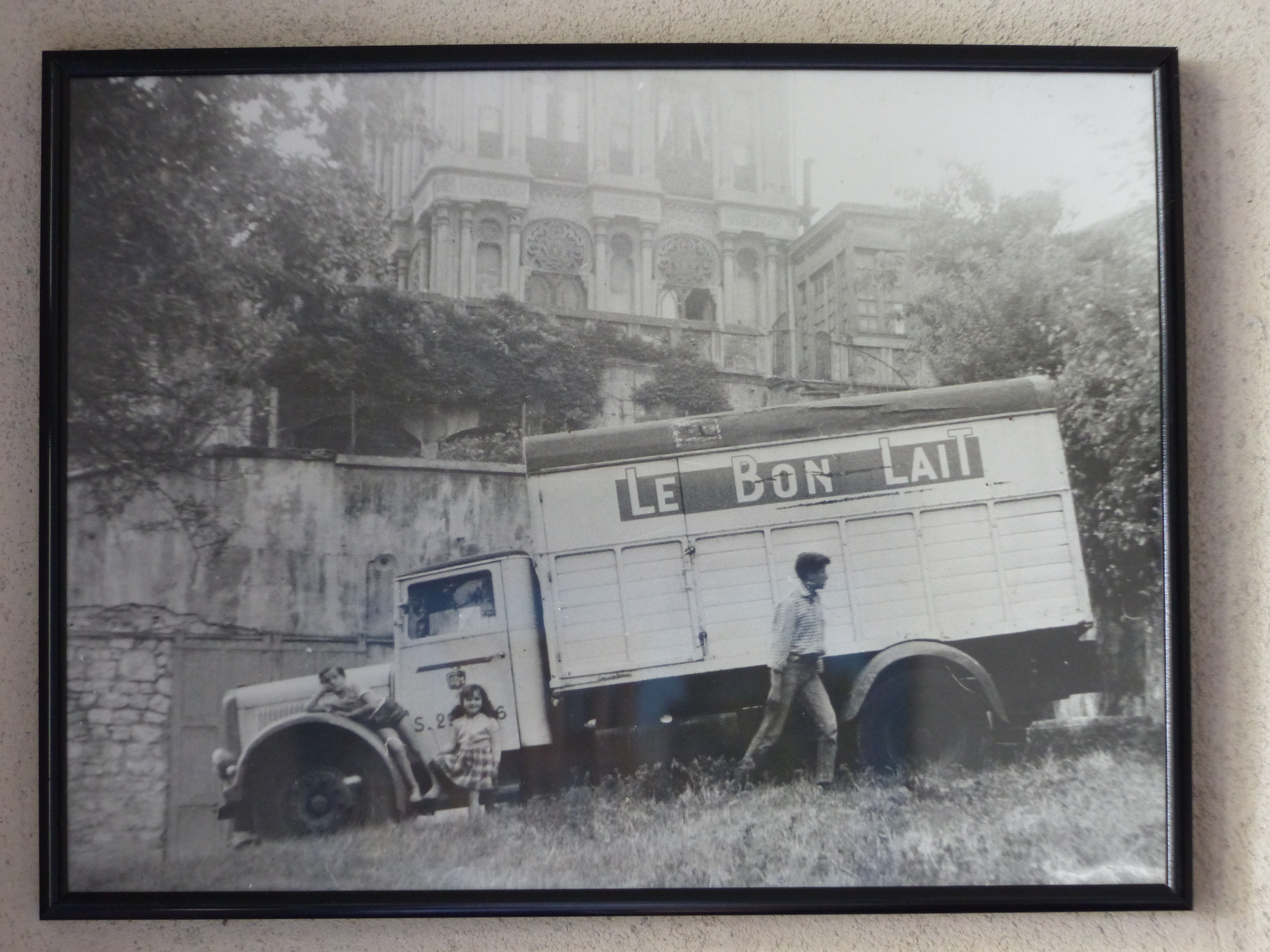 La Casamaures, Saint-Martin-le-Vinoux, Isère, France. Cette photo fait partie d'une série de 30 photos. Don à Wikimédia par Sylvie Jeanson, à l'occasion des 30 ans de l'association "La Casamaures d'hier et d'aujourd'hui", dans le cadre des Journées contributives à la Casamaures du 4 et 5 avril 2015. Photo autorisée par l'association et par la proprietaire Christiane Guichard. Photo du Bon Lait en 1952.